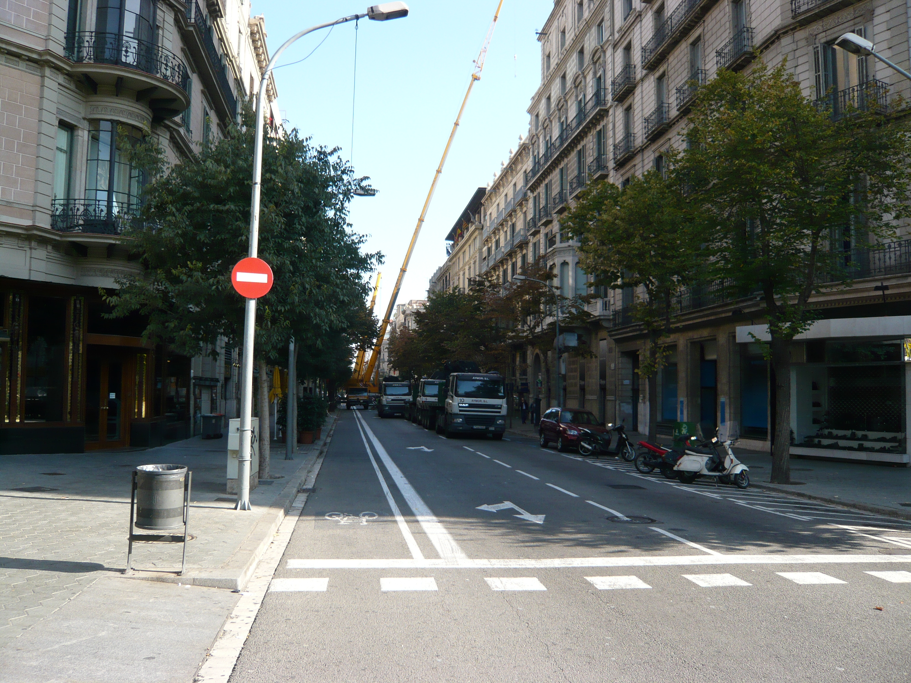 Carrer Diputació, Barcelona (seen from passeig de gracia)